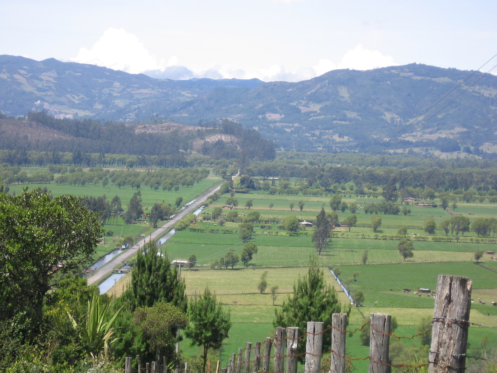 Simijaca-Panoramica1